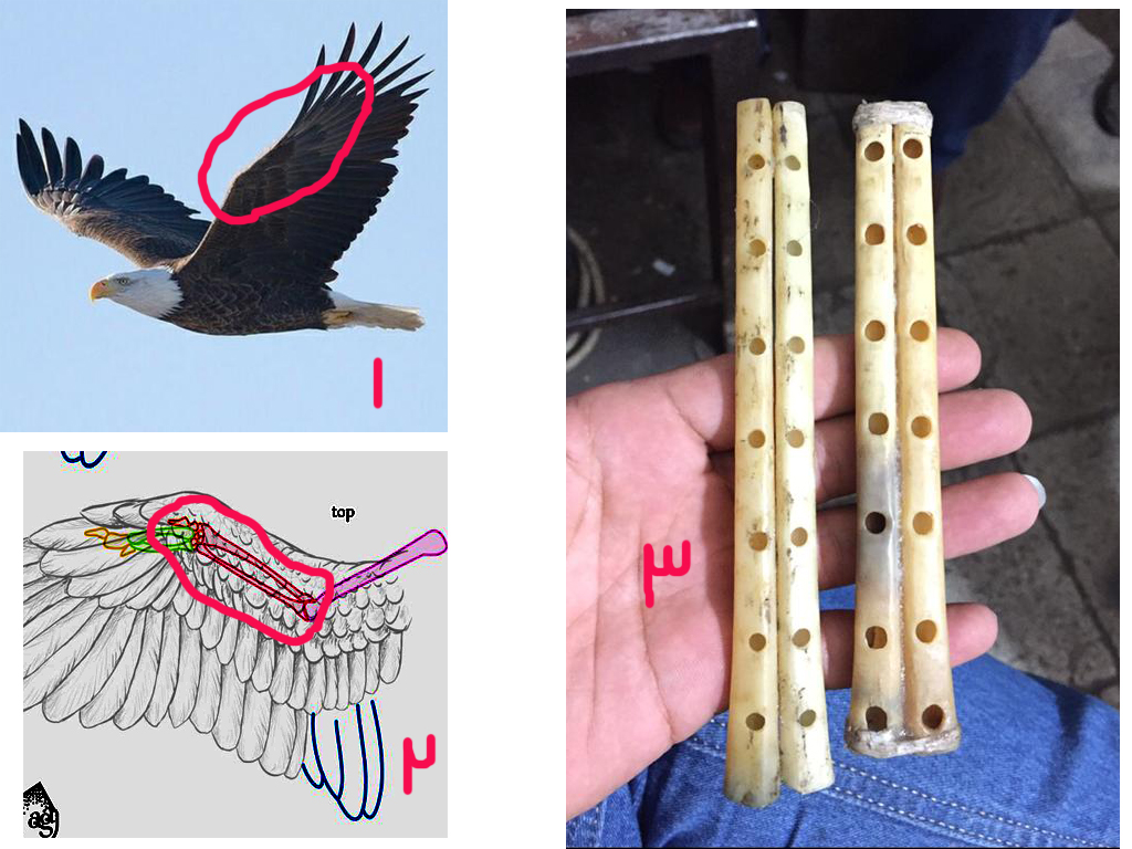 در شماره یک بال باز عقاب دیده میشود. در تصویر دوم عکس اناتومی بال پرنده و دور استخوانی که برای ساخت قوشمه استفاده میشود خط کشیده شده و تصویر سوم دو استخوان است که سوراخ شده و در حال آماده سازی برای ساخت قوشمه است.